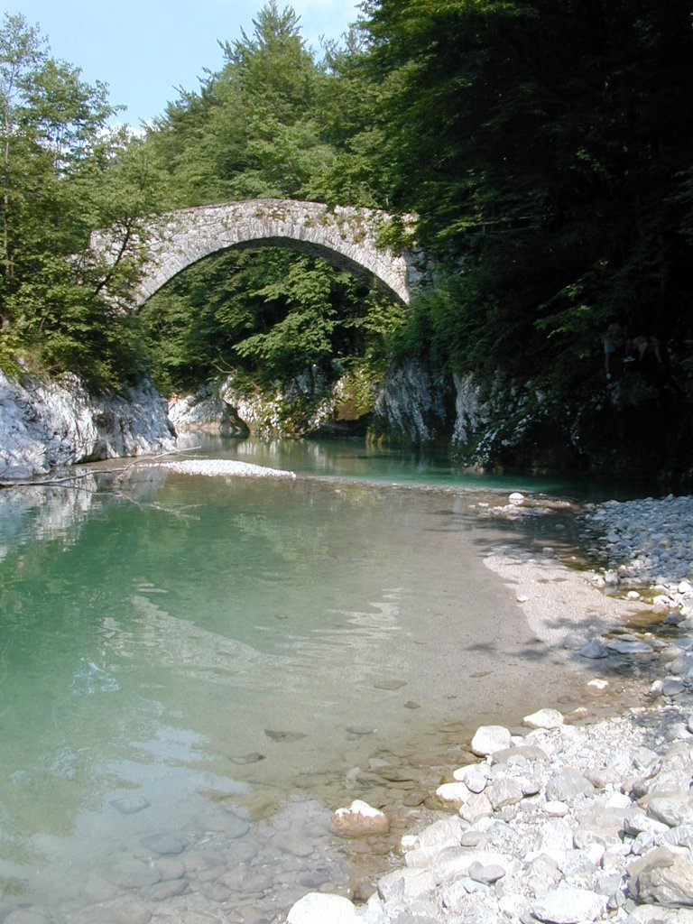 Ponte napoleonico sull'altro corso del fiume Natisone, Slovenia